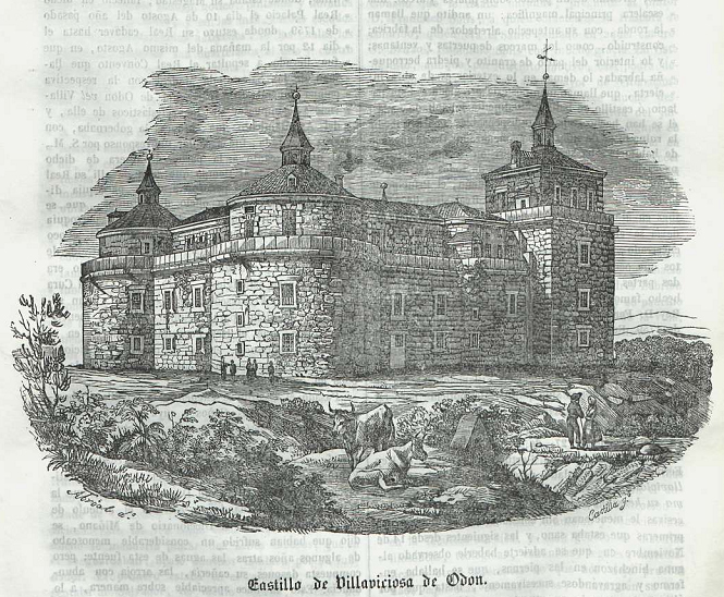 Castillo de Villaviciosa de Odón, grabado publicado en la revista española Semanario Pintoresco Español.